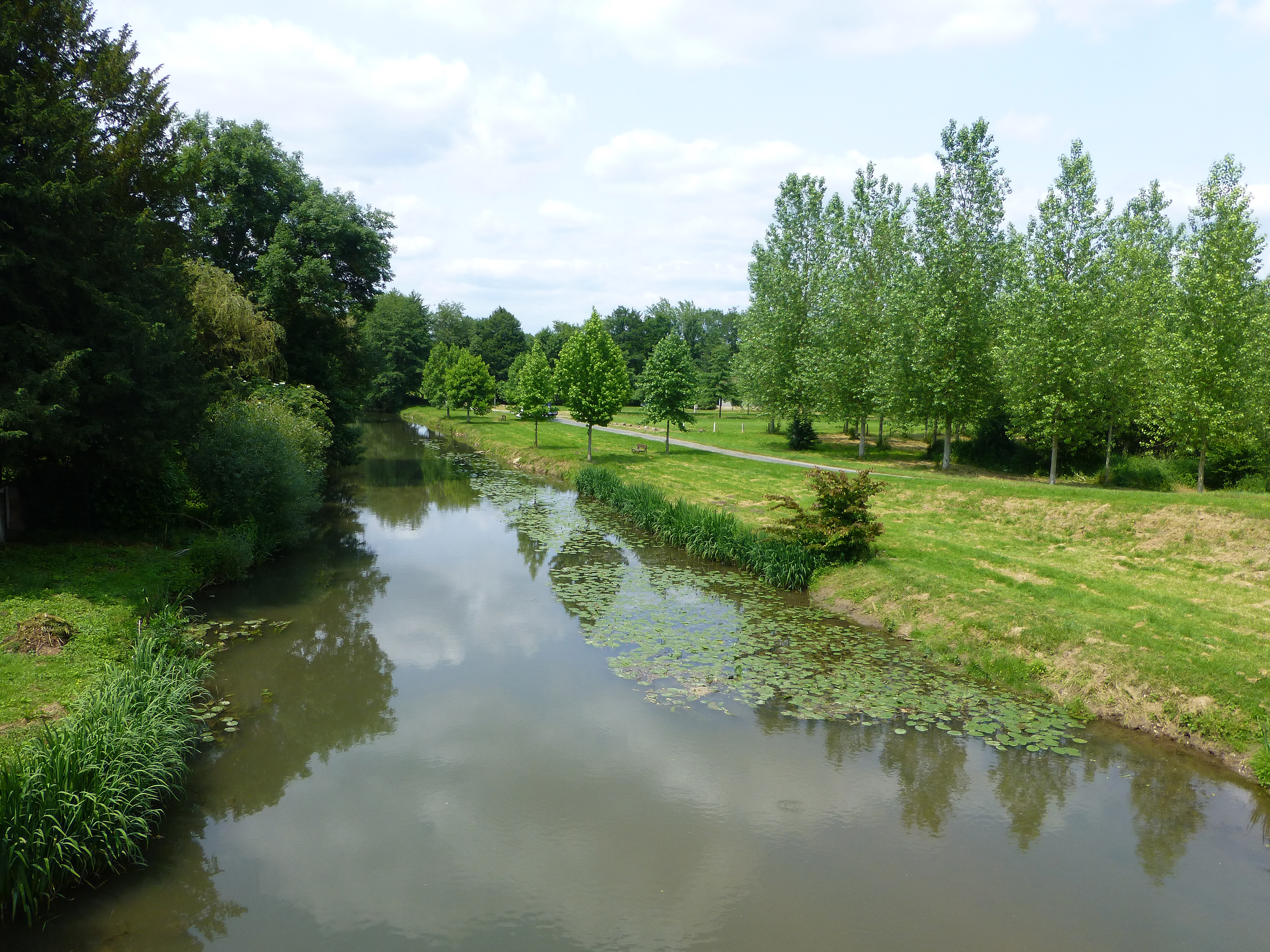 La Grande Sauldre à Argent-sur-Sauldre (Cher), vue depuis le pont, à proximité du château